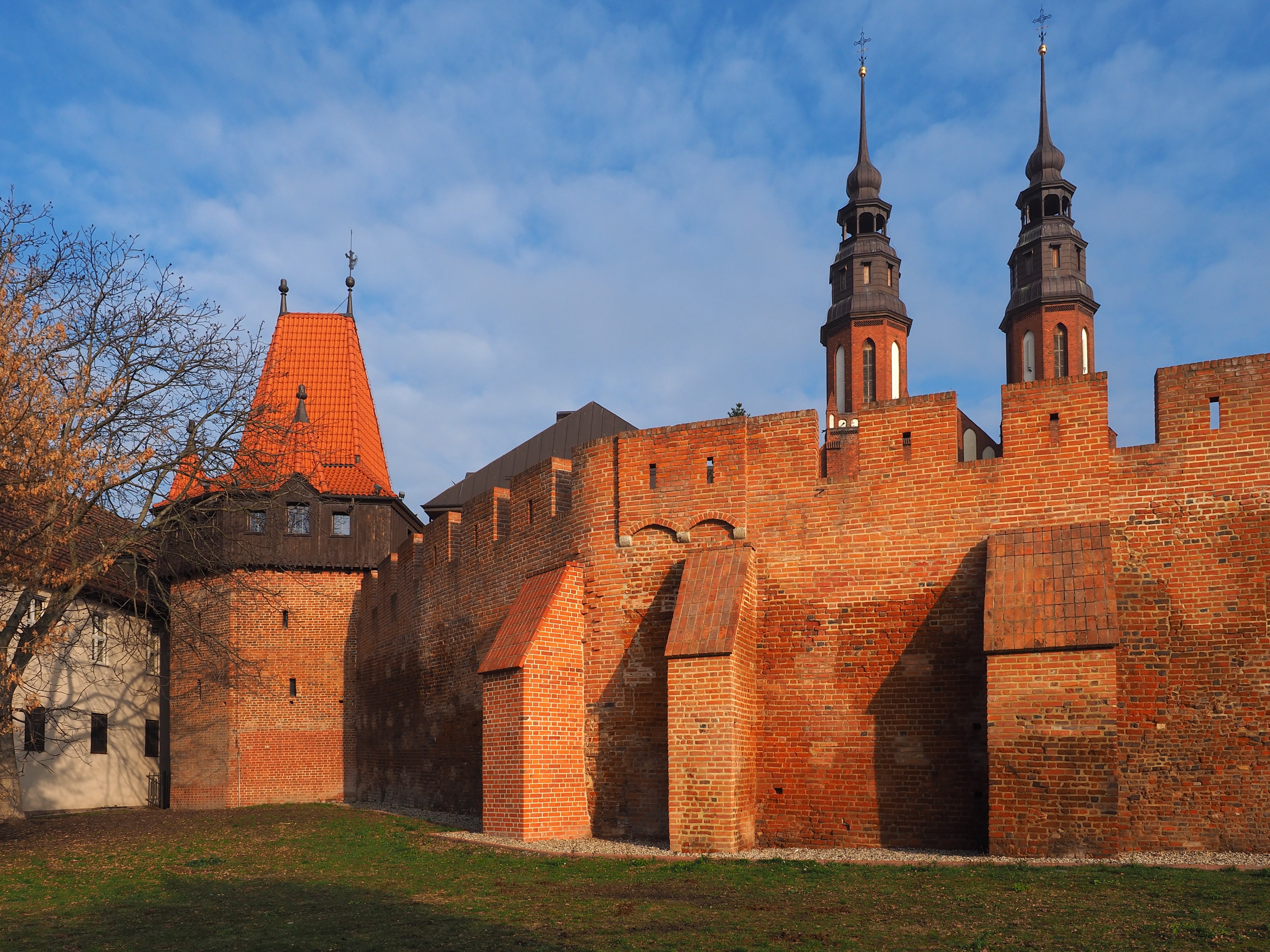 Opole, Układ urbanistyczny w ramach założenia średniowiecznego Wikidata has entry Q30236645 with data related to this item.